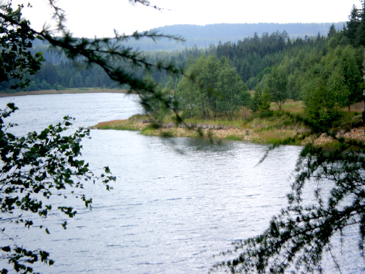 Pilská nádrž, v pozadí Brdce (839 m)